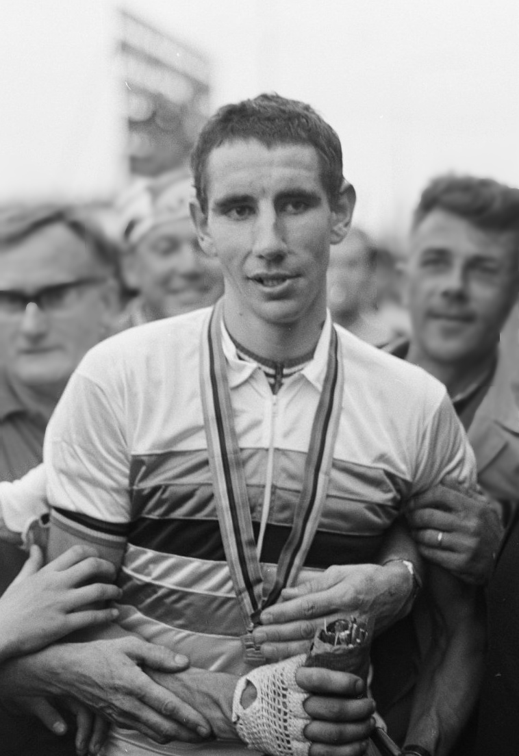 WK Wielrennen, Graham Webb